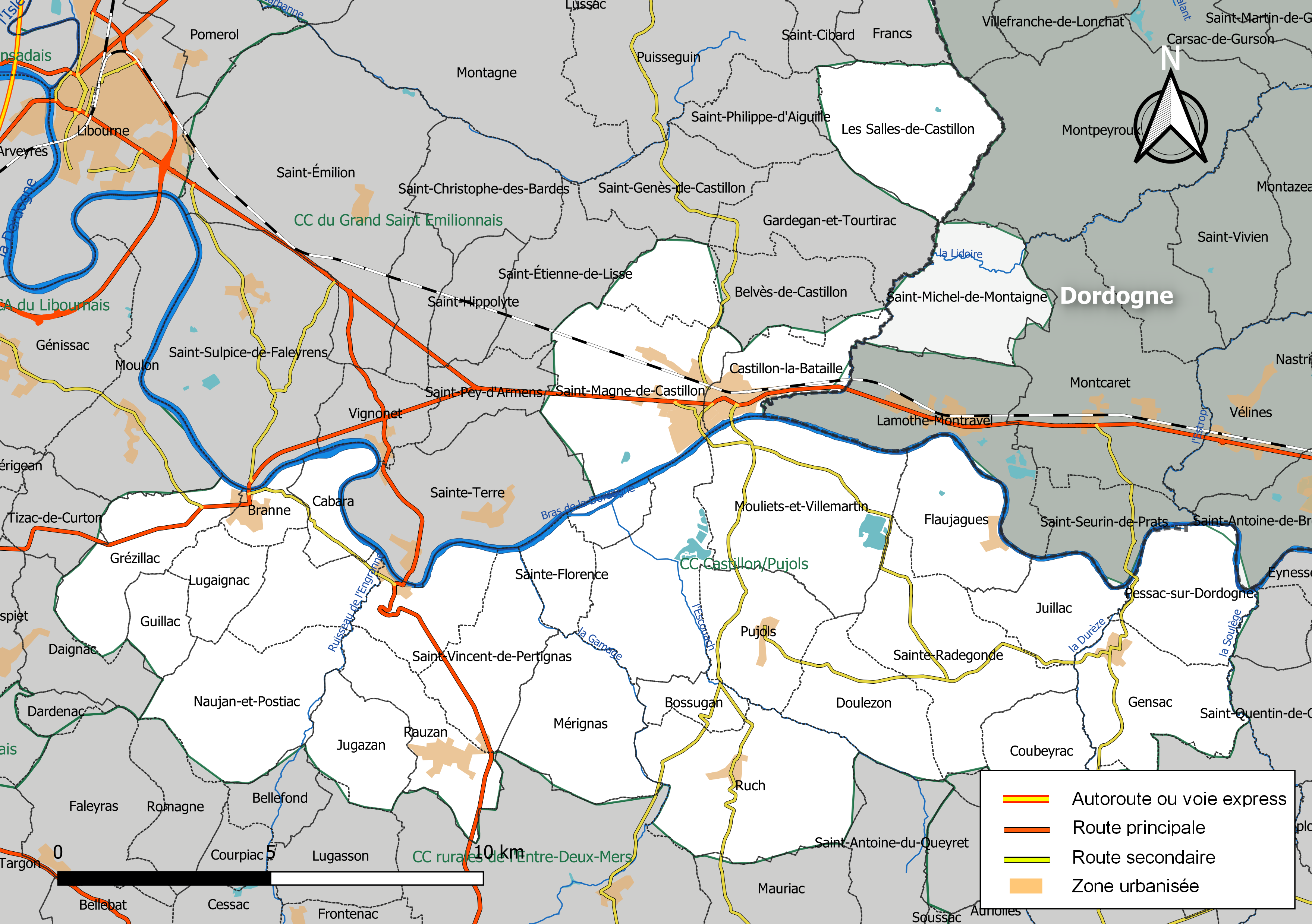 Carte géographique de la Communauté de communes Castillon Pujols, département de la Gironde, France. Composition au 1er janvier 2019.